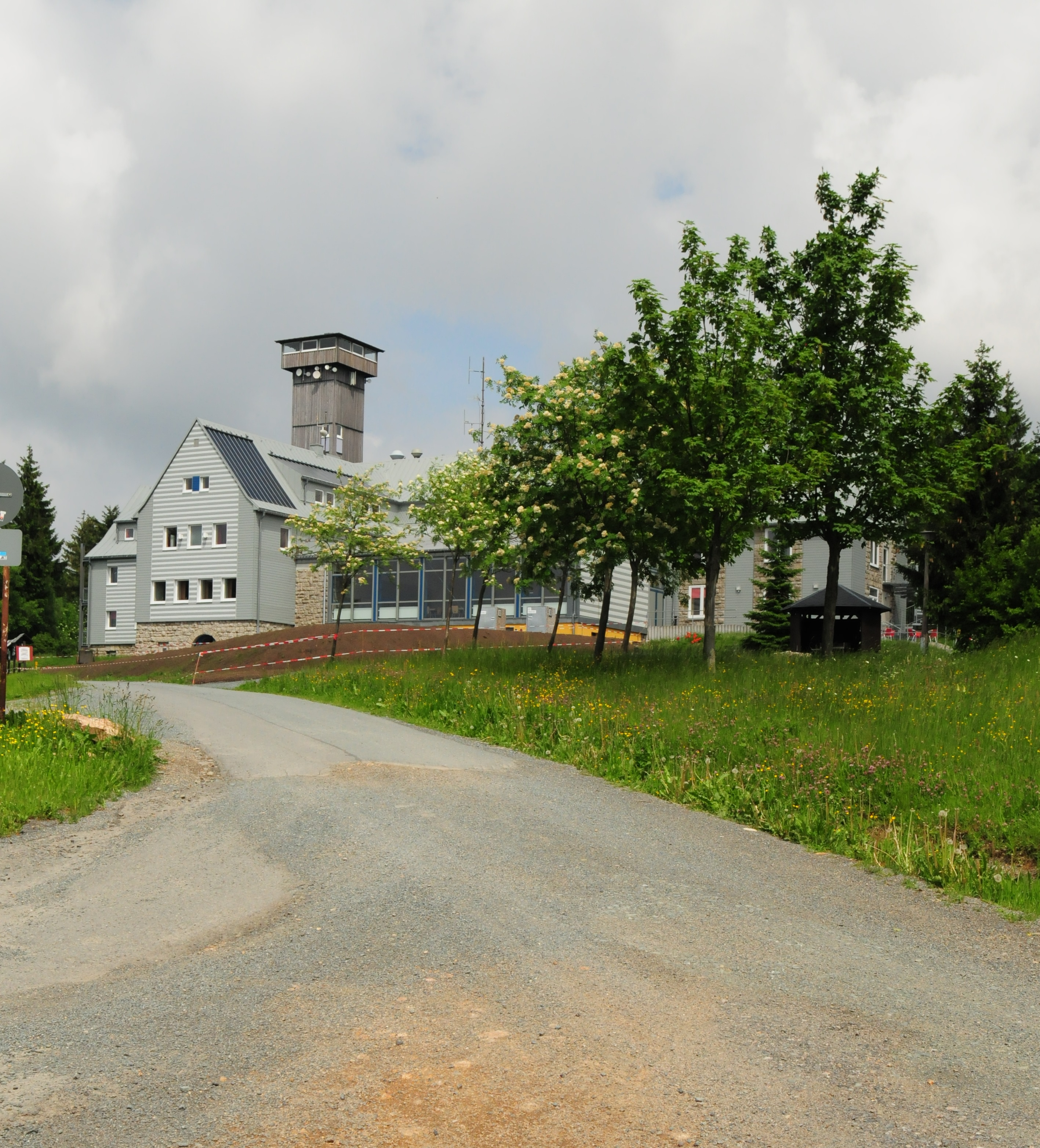 Klingenthal, Jugendherberge Klingenthal auf dem Aschberg, dahinter der Aussichtsturm "Otto Hermann Böhm" (Vogtlandkreis, Sachsen, Deutschland